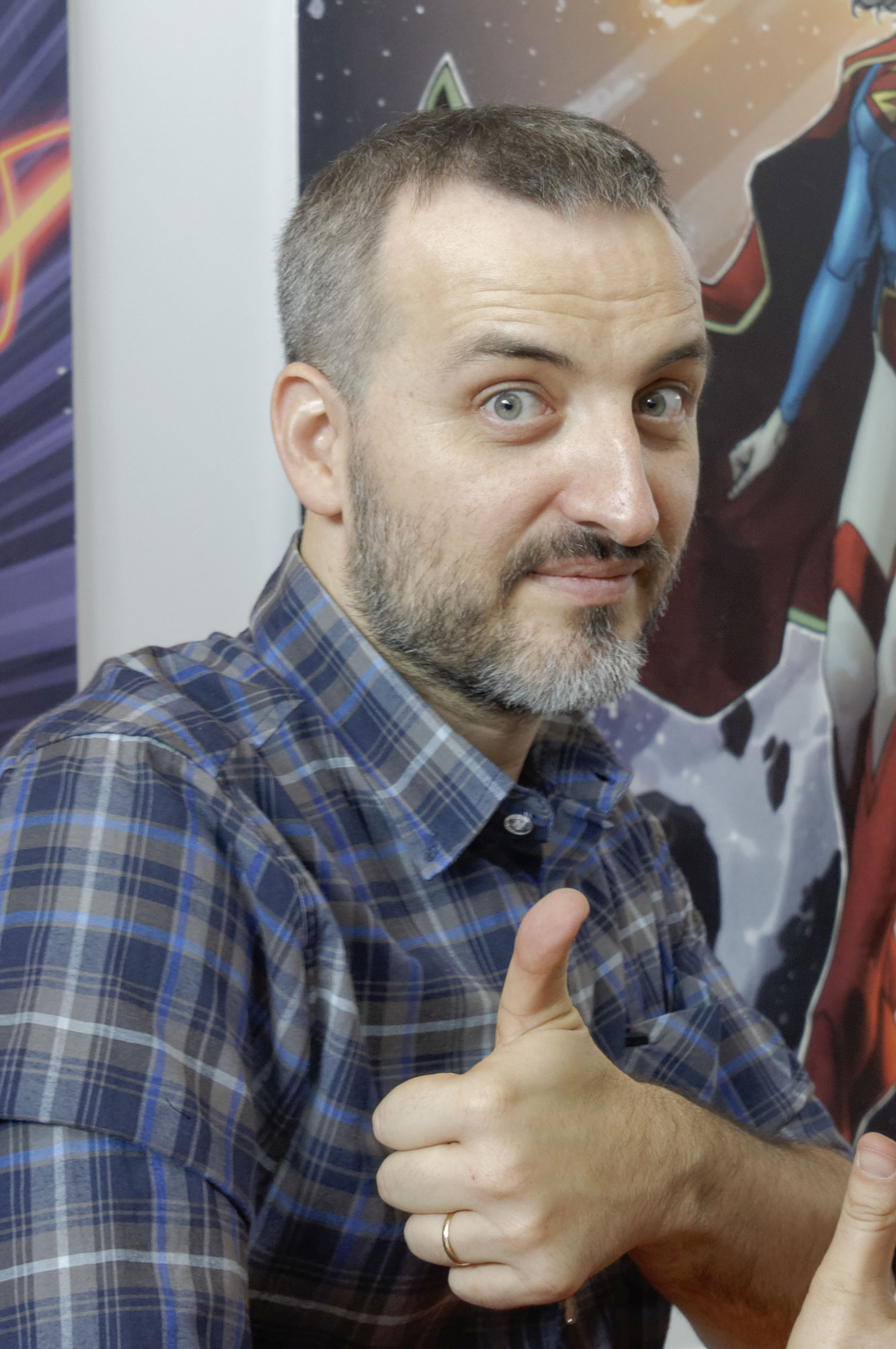 Bilder von der Comic Con Germany in Stuttgart 2017